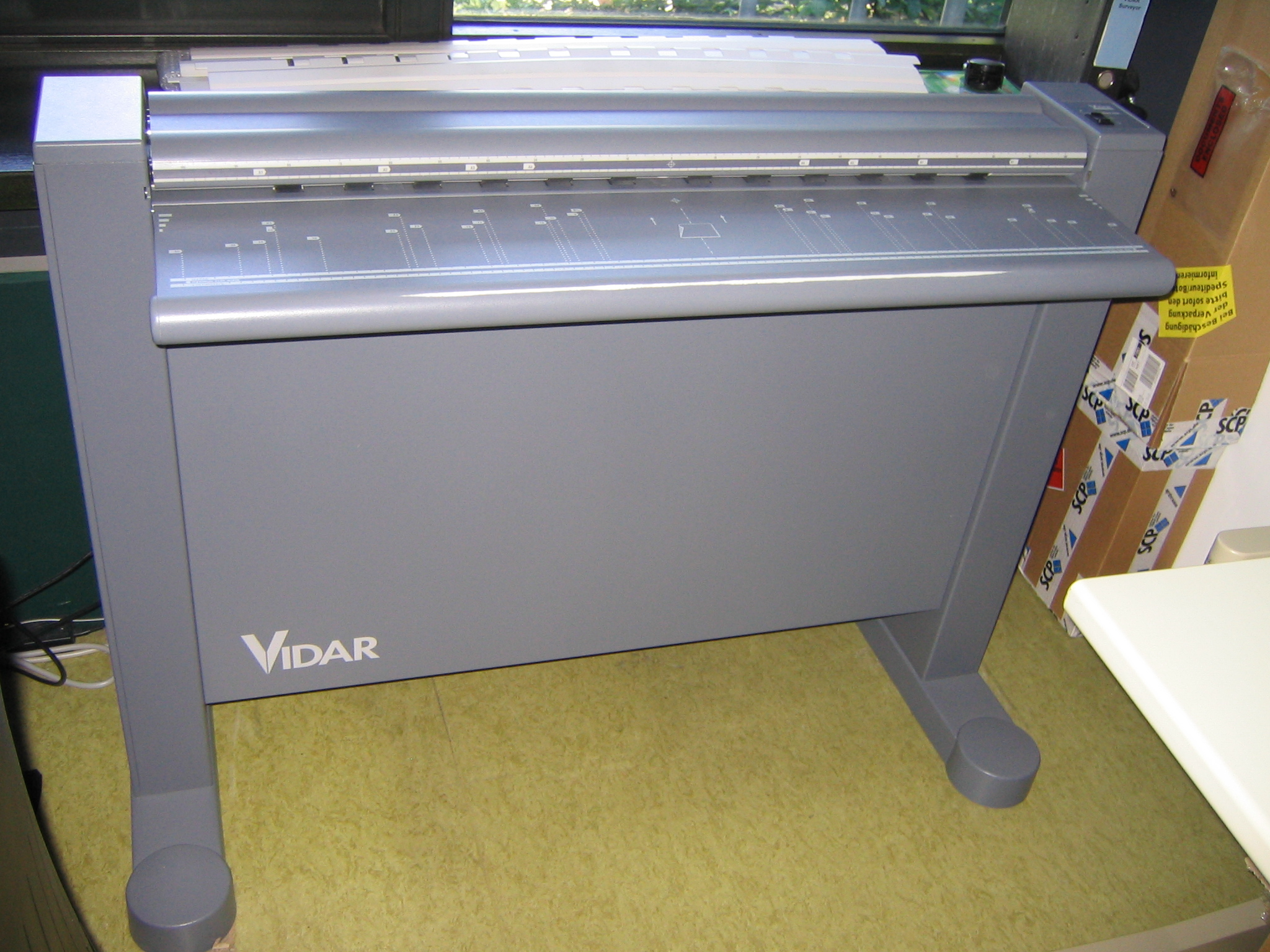 A0 Scanner von Vidar